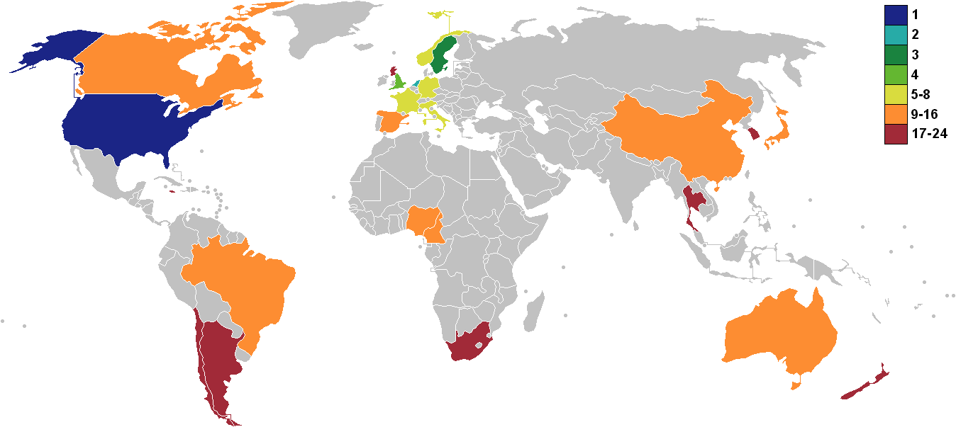 coupe du monde de football féminine 2019